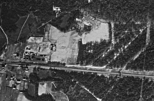 Aerial photo of Sobibór in 1944